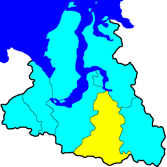 Пуровский район на карте Ямало-Ненецкого АО